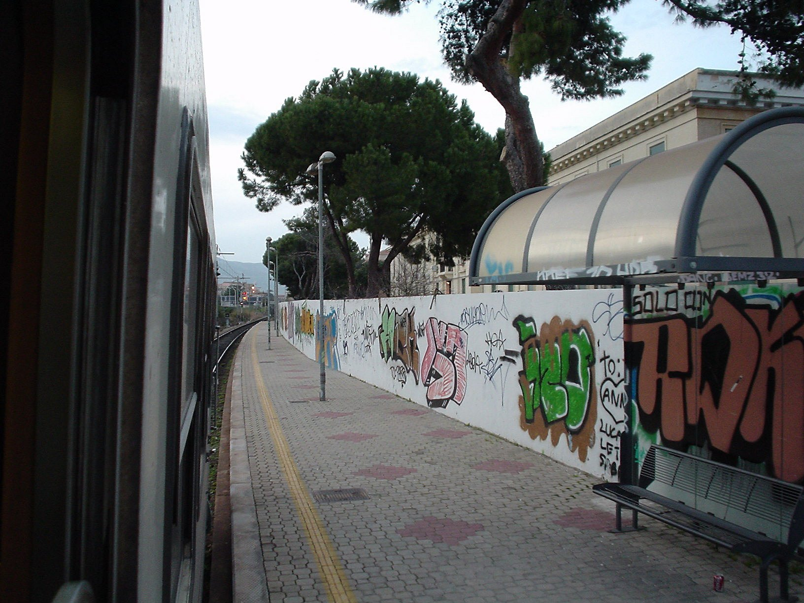 Questa fermata che faceva parte del circuito metropolitano di Palermo è stata attiva tra il 1990 ed il 2009, successivamente è stata smantellata per i lavori del passante ferroviario ed il binario è stato raddoppiato e spostato nella galleria sottostante, dove esiste anche la nuova fermata Vespri.